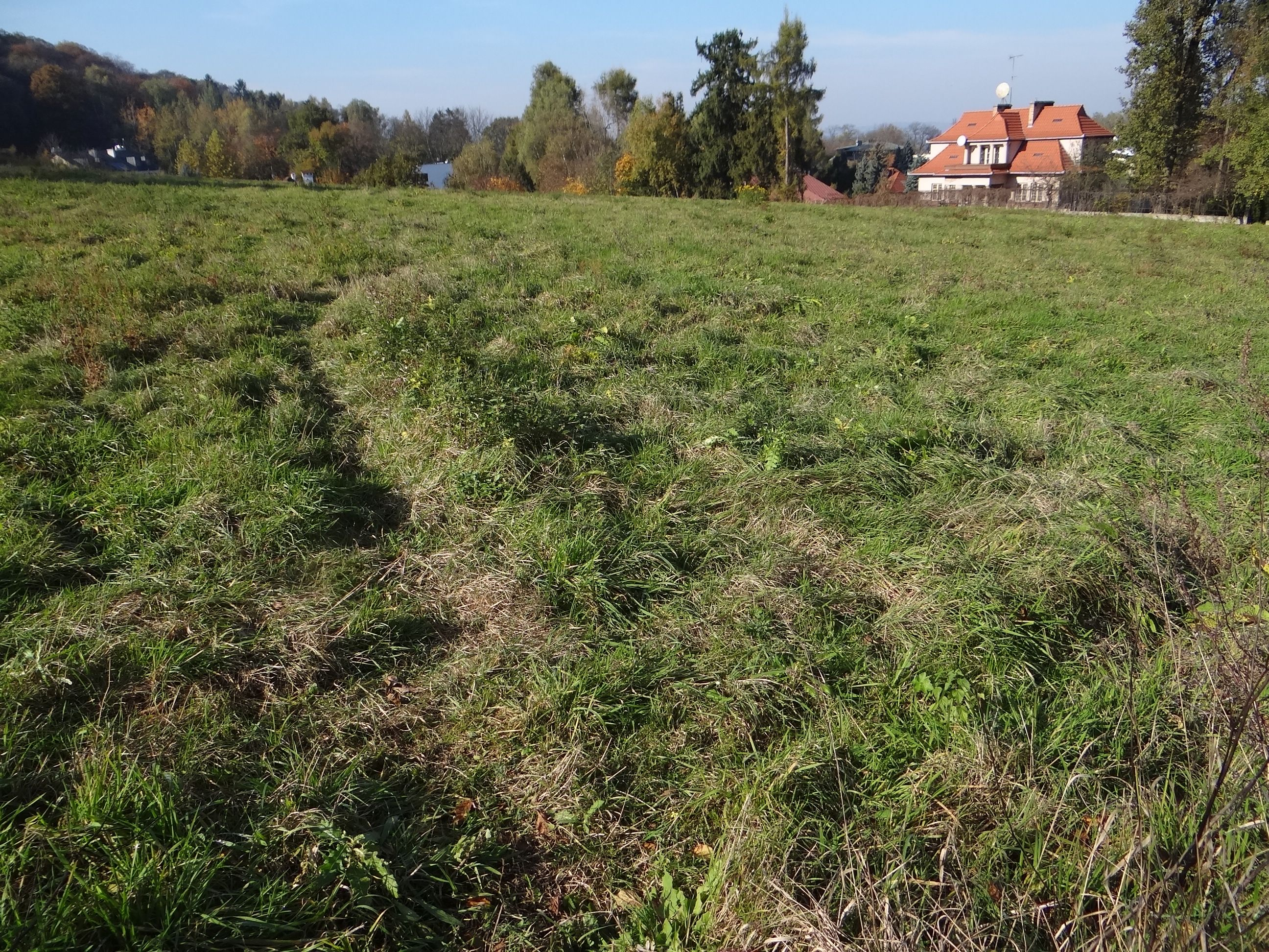 Wesoła Polana w Lesie Wolskim w Krakowie